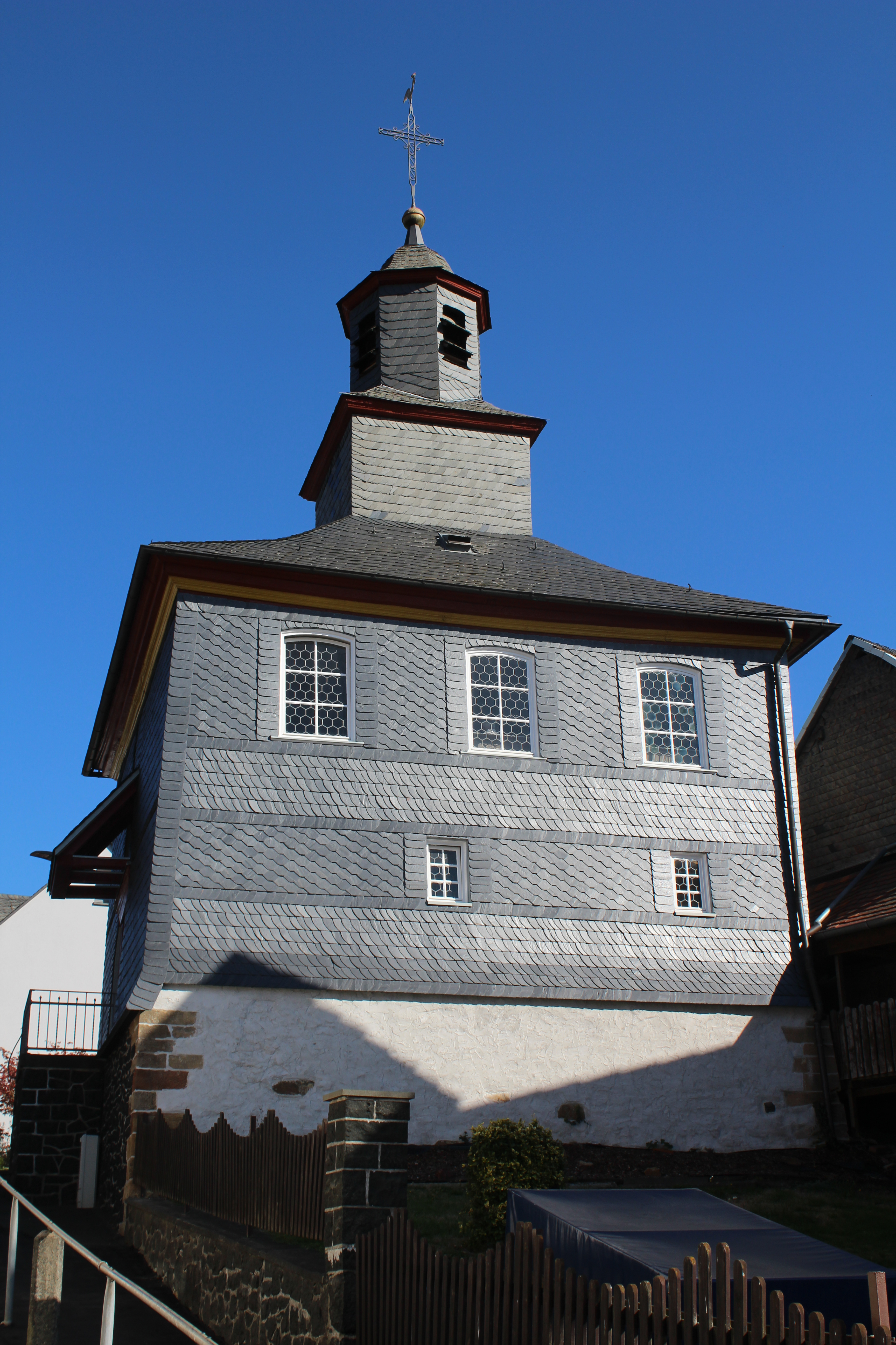 Evangelische Kirche Runzhausen (Gladenbach), Landkreis Marburg-Biedenkopf, Hessen, Deutschland